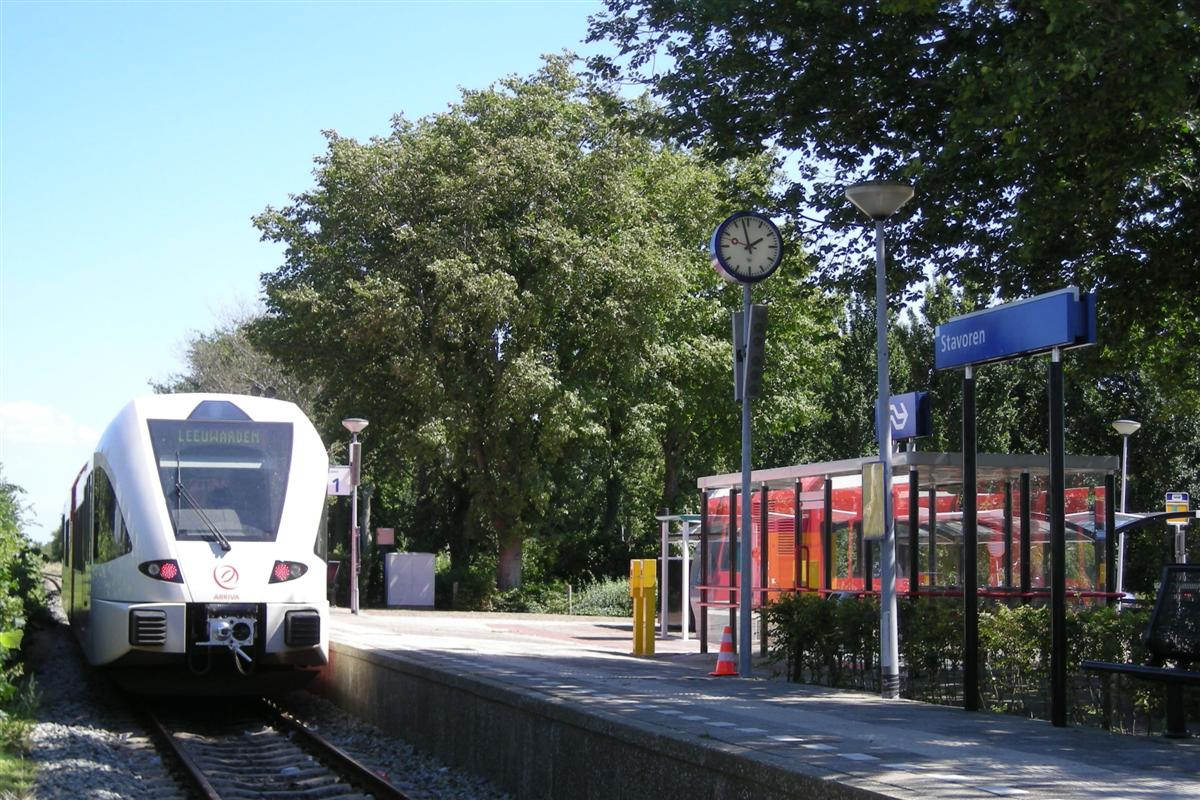 Stasjon Starum